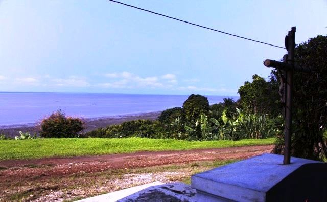 Le Komo est un Fleuve du Gabon. Vue à partir de Donguila à Ntoum